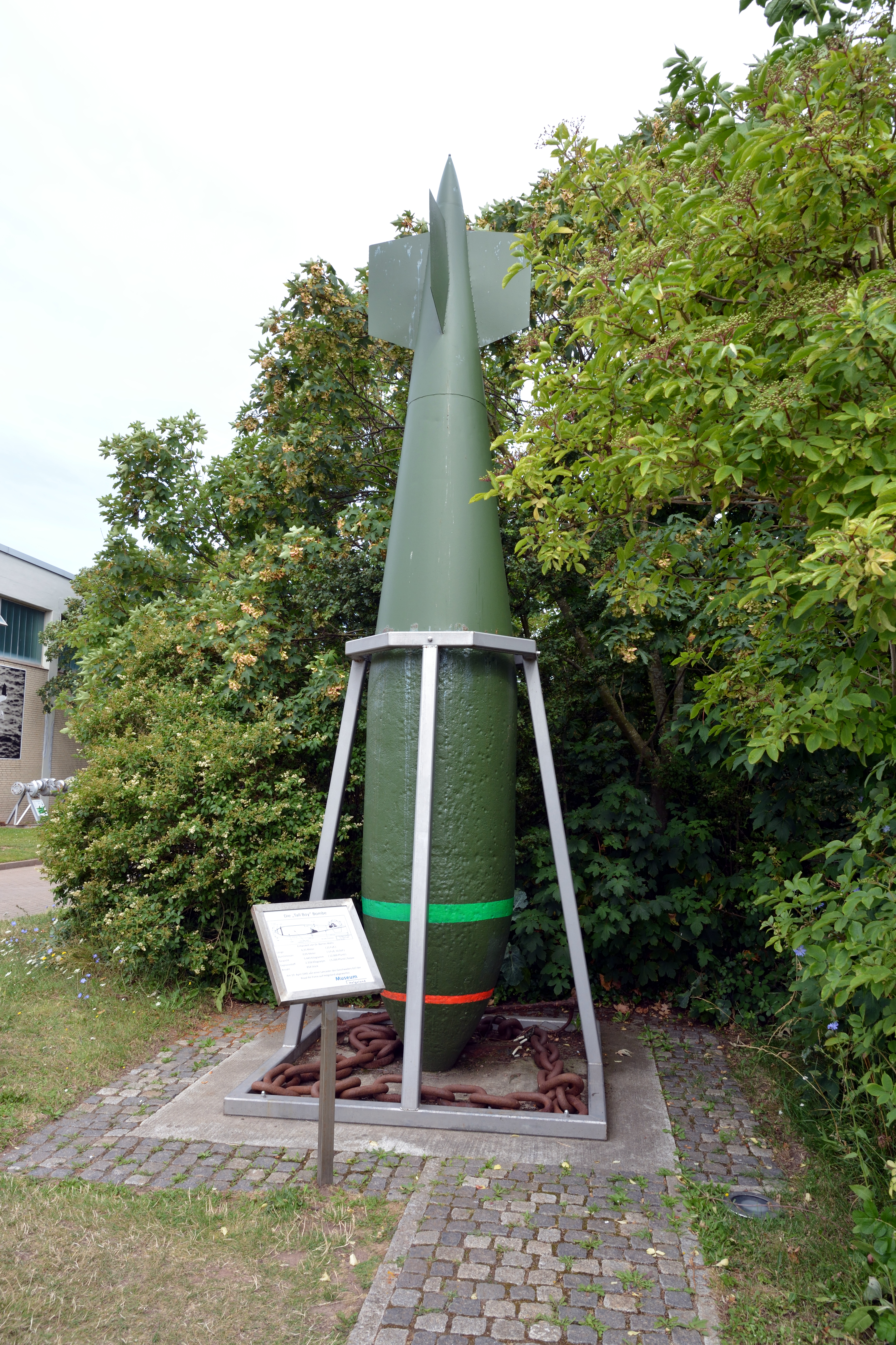 Bilder von Helgoland im Juli 2019Im Eingangsbereich des Museums Helgoland: Tallboy Bombe